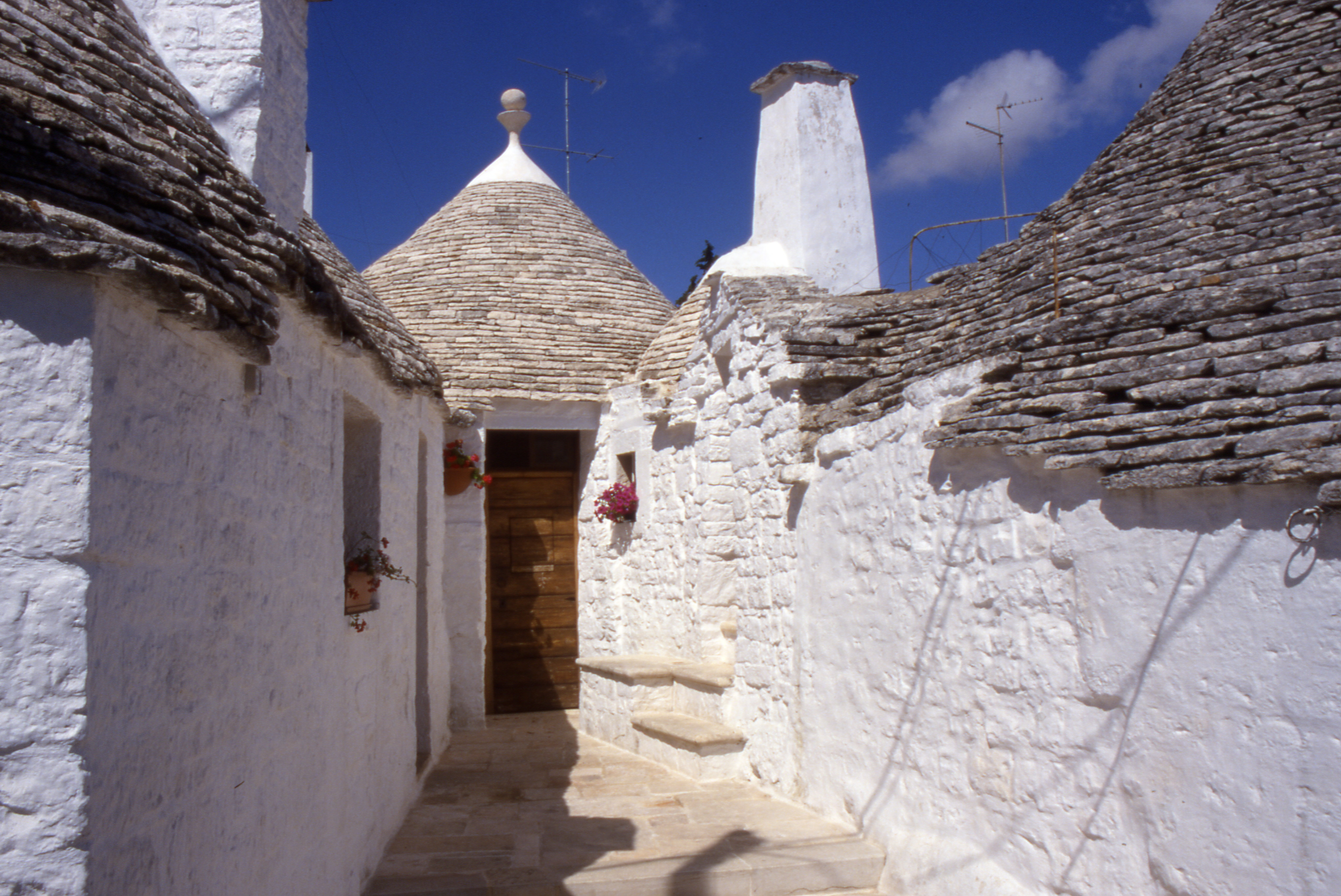 Alberobello Ansicht